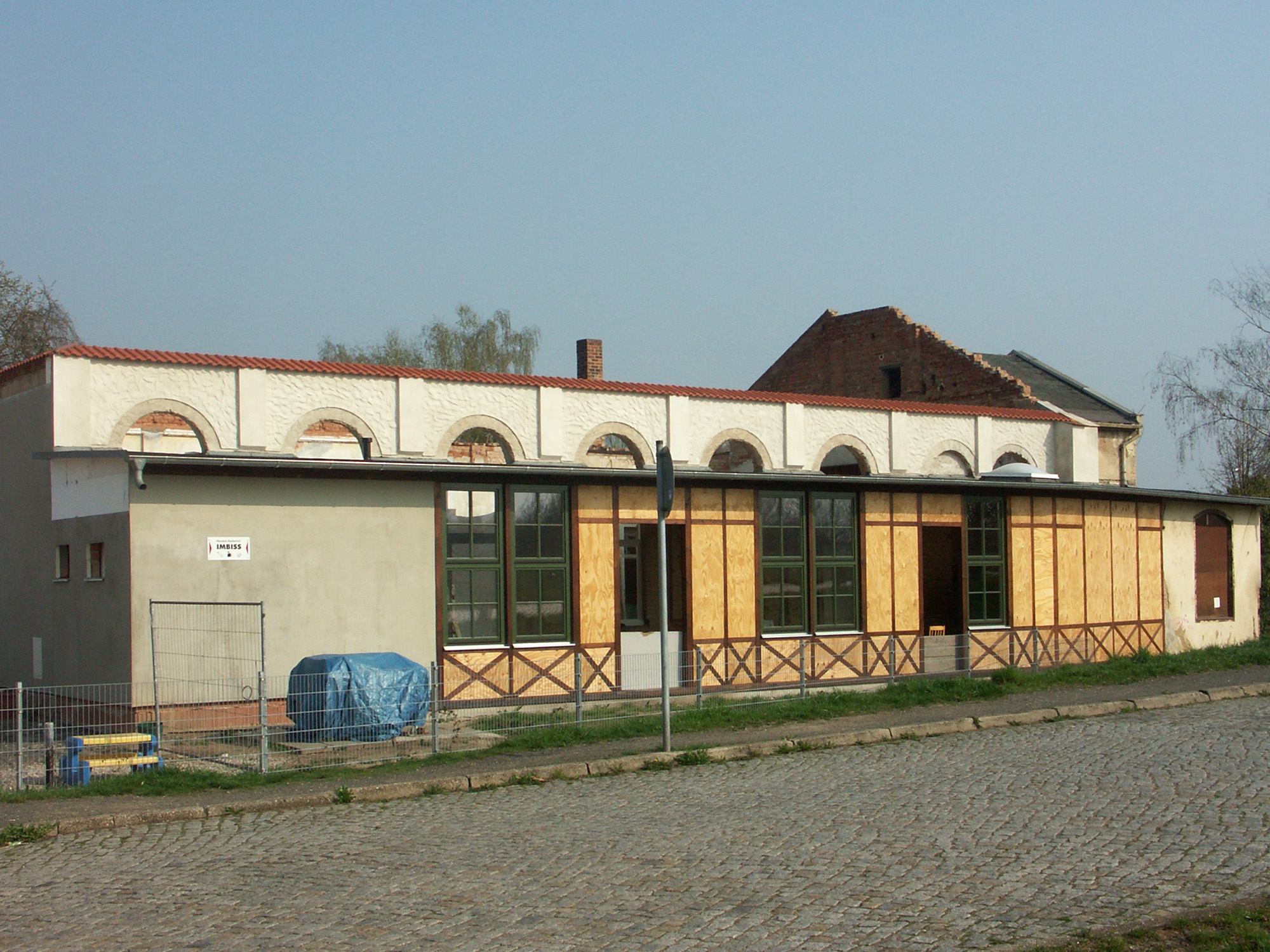 Ehemalige Central-Halle Gaschwitz, Zustand 2009